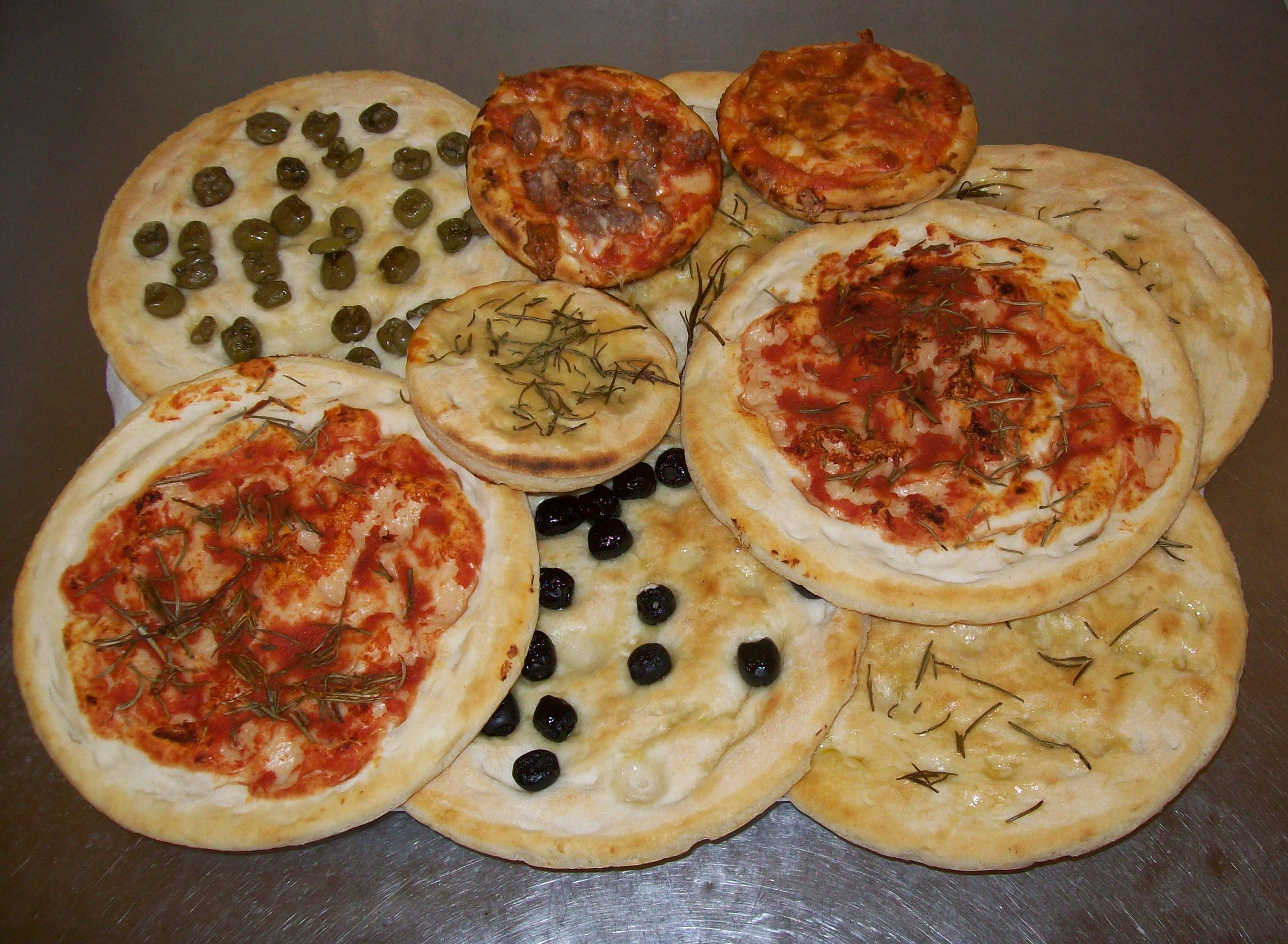 Trionfo di pizze al tegamino